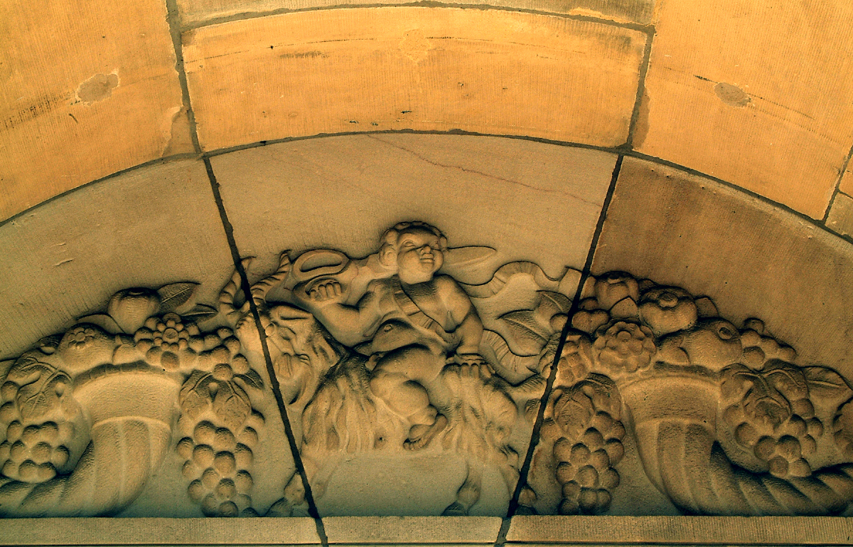 Detail an dem Kaufhaus in der Großen Packhofstraße/Ecke Osterstraße in Hannover